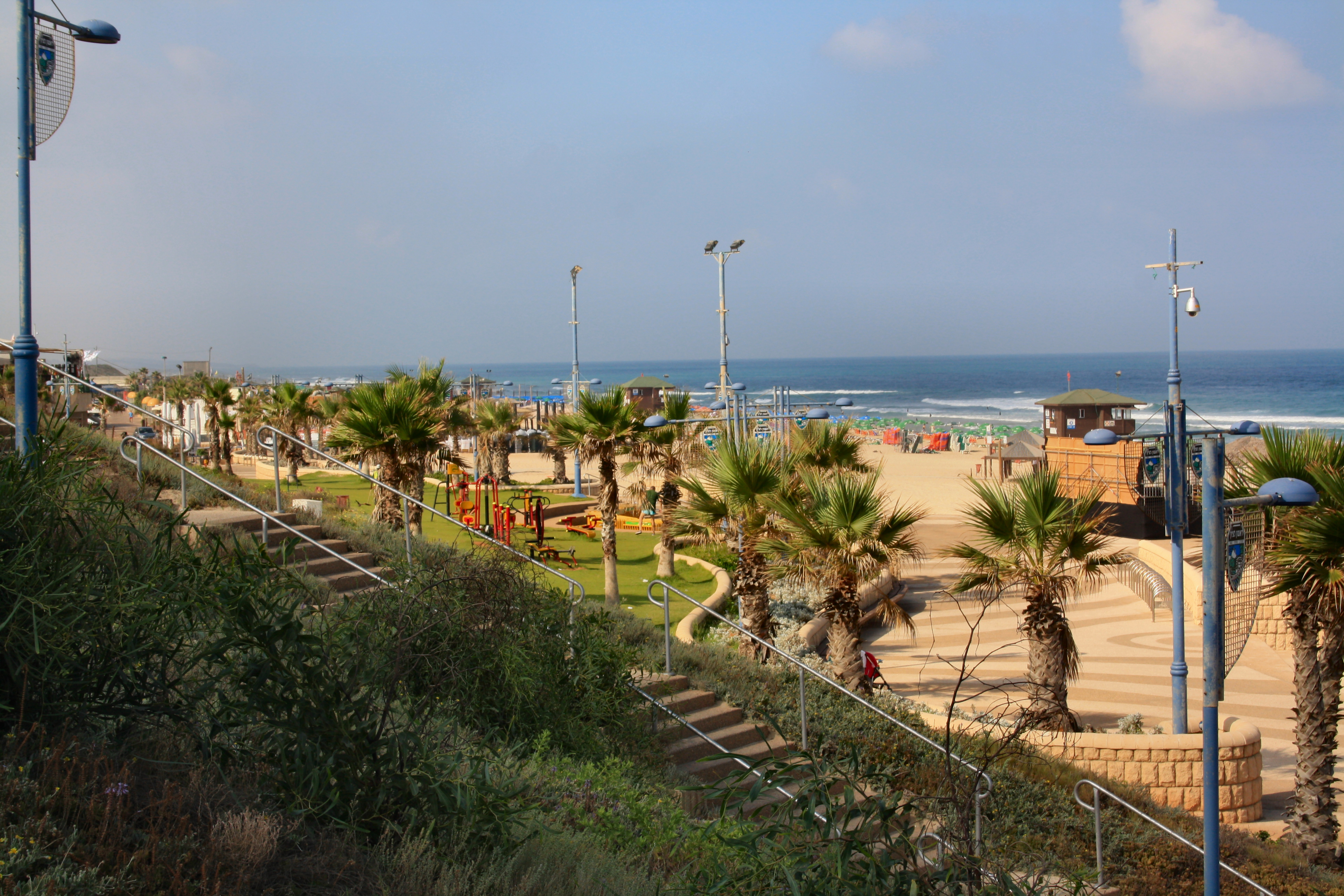 חוף ראשון לציון.